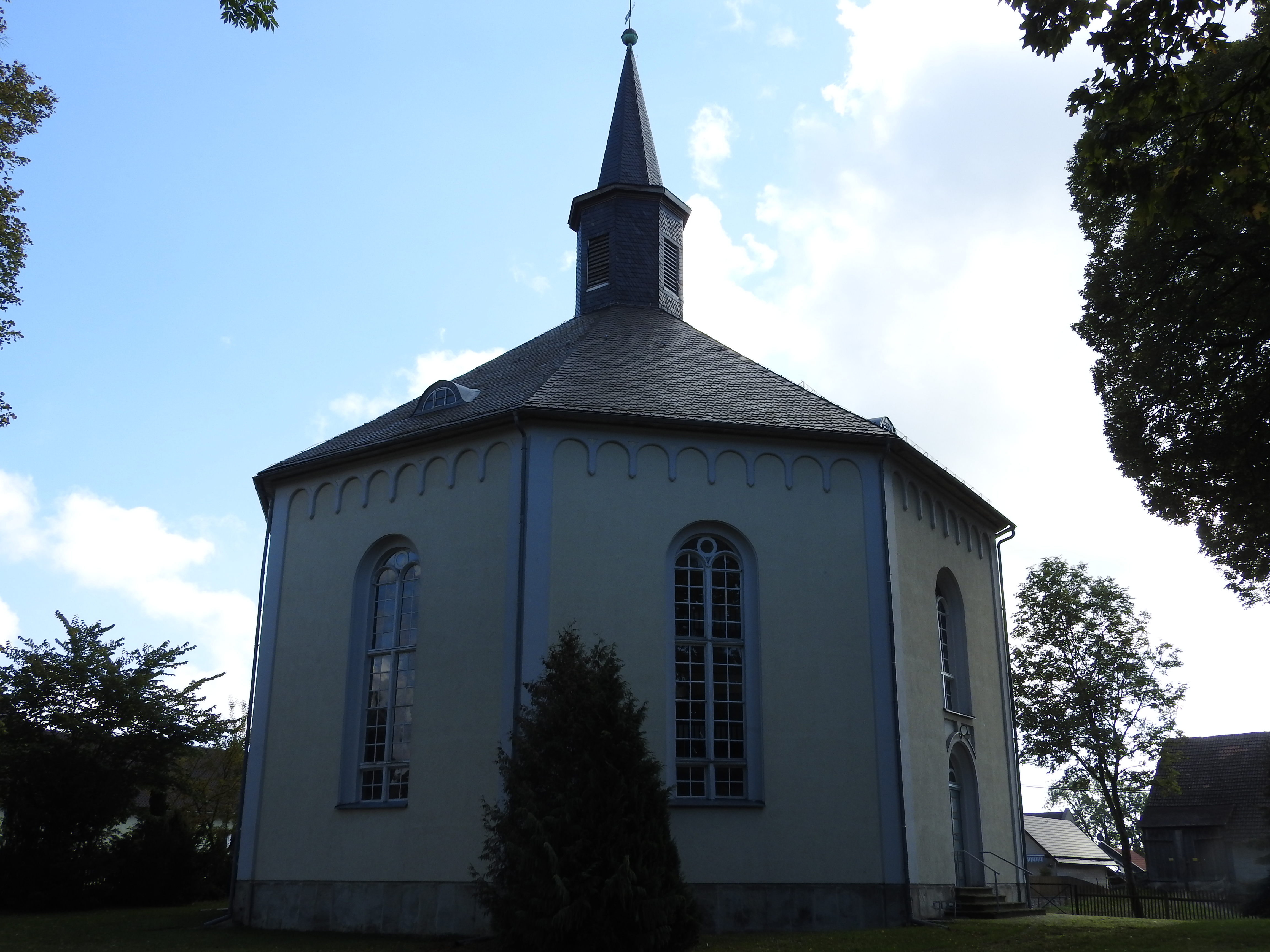 Martinskirche in Oettersdorf, Thüringen